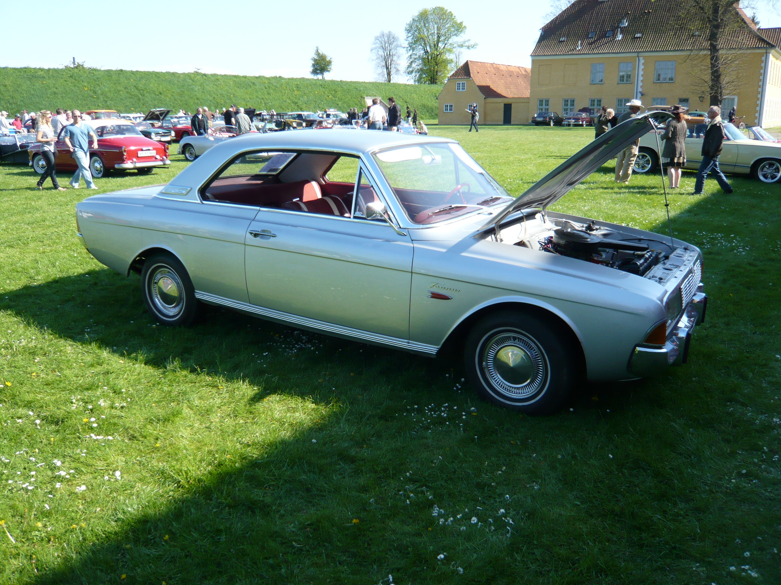 Ford P5, Copenhagen